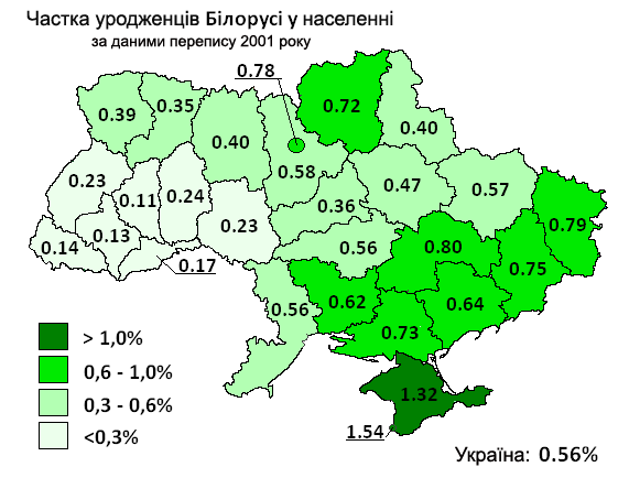 Частка населення народженого на території Білорусі / БРСР за даними перепису 2001 р.